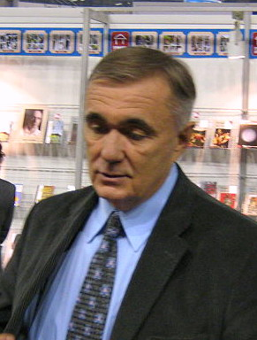 Dušan Kovačević, serbian author